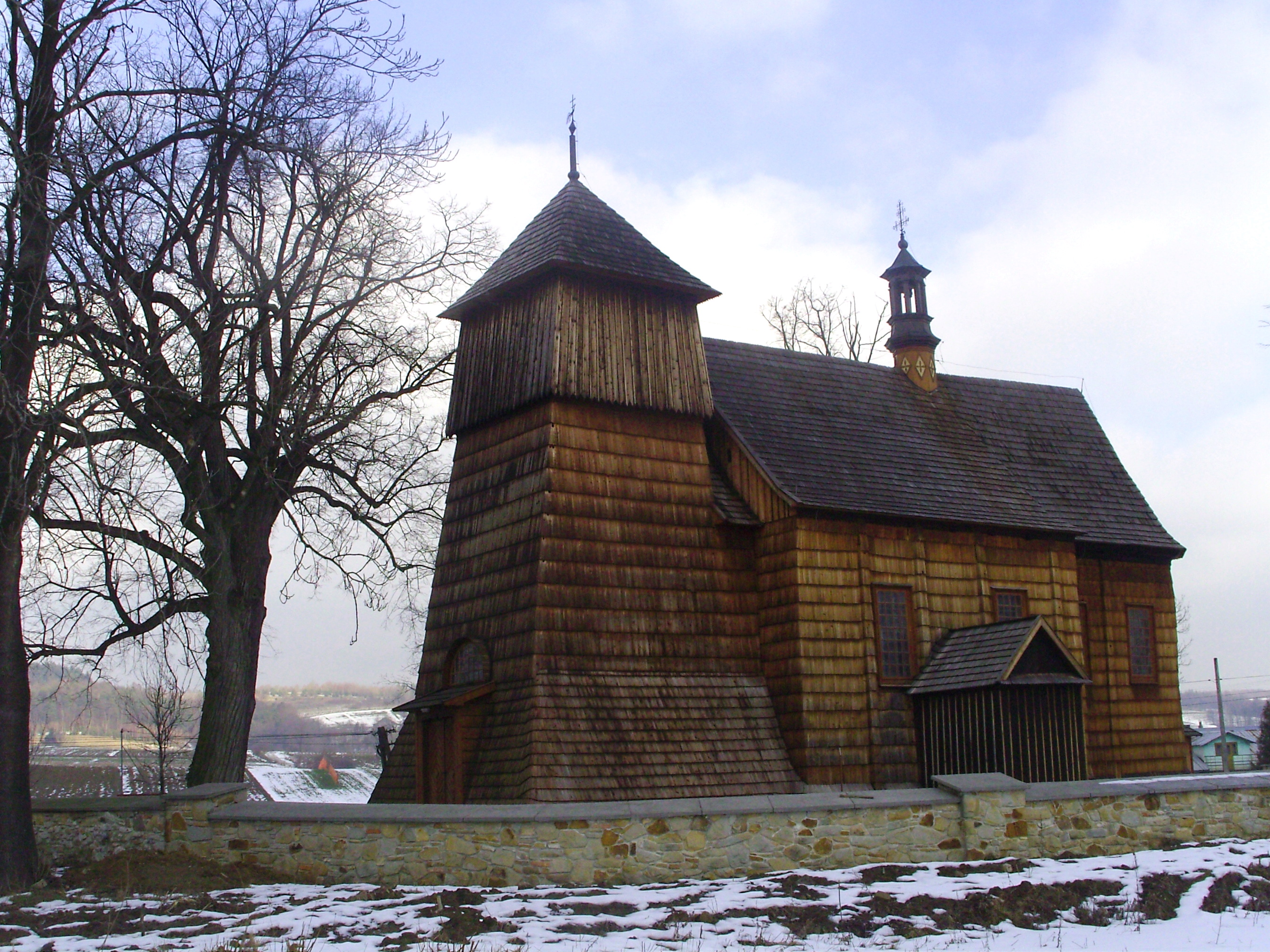 Kościół św. Katarzyny w Gogołowie z XVII wieku.